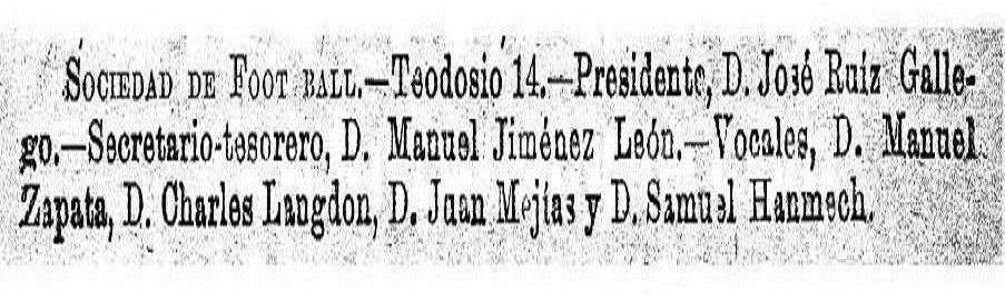 Detalle de la Guia Oficial del Comercio y de la Industria de Sevilla y su Provincia, 1905